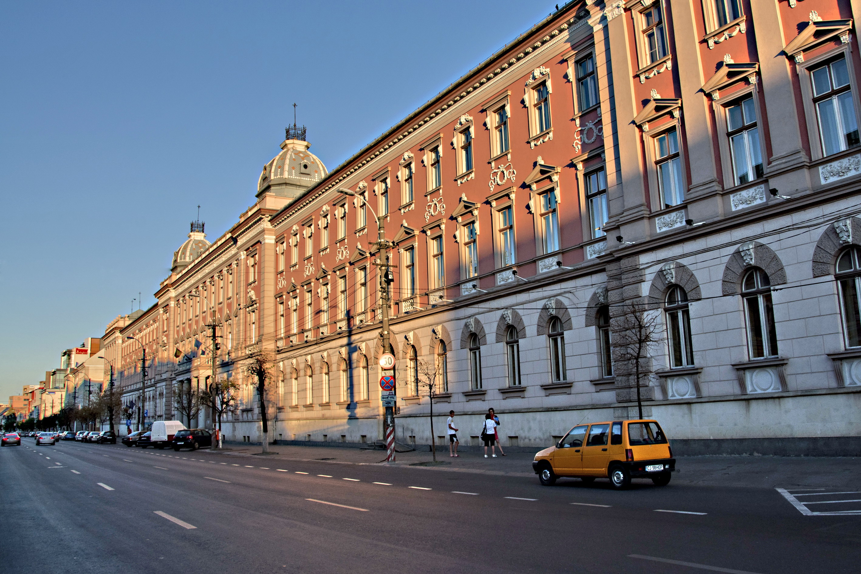 Palatul de Justiție din Cluj, Piața Ștefan cel Mare